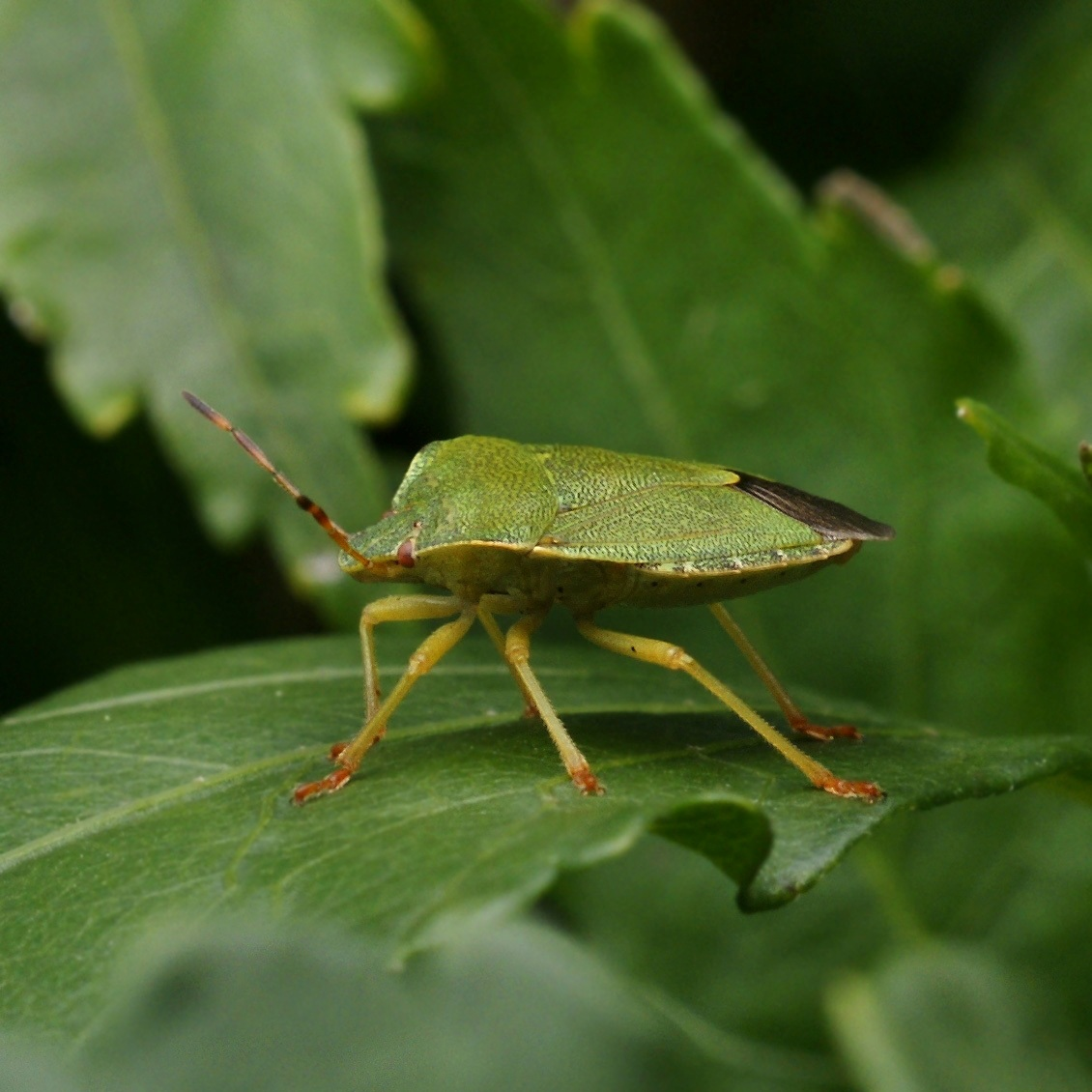 Die Grüne Stinkwanze, auch als Gemeine Stinkwanze, oder Gemeiner Grünling bezeichnet, ist eine in Europa weit verbreitete Insektenart. Fundort Dornbirn.